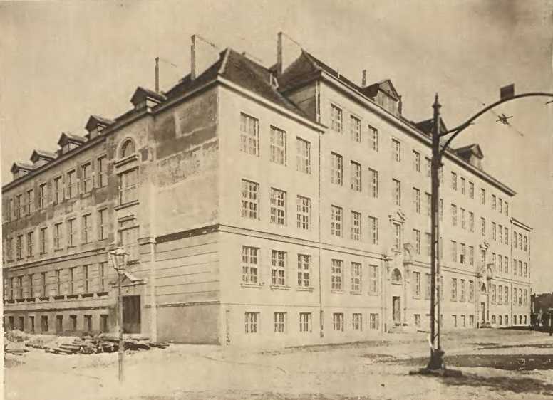 Budynek szkolny przy ul. Czerniakowskiej 128 w Warszawie